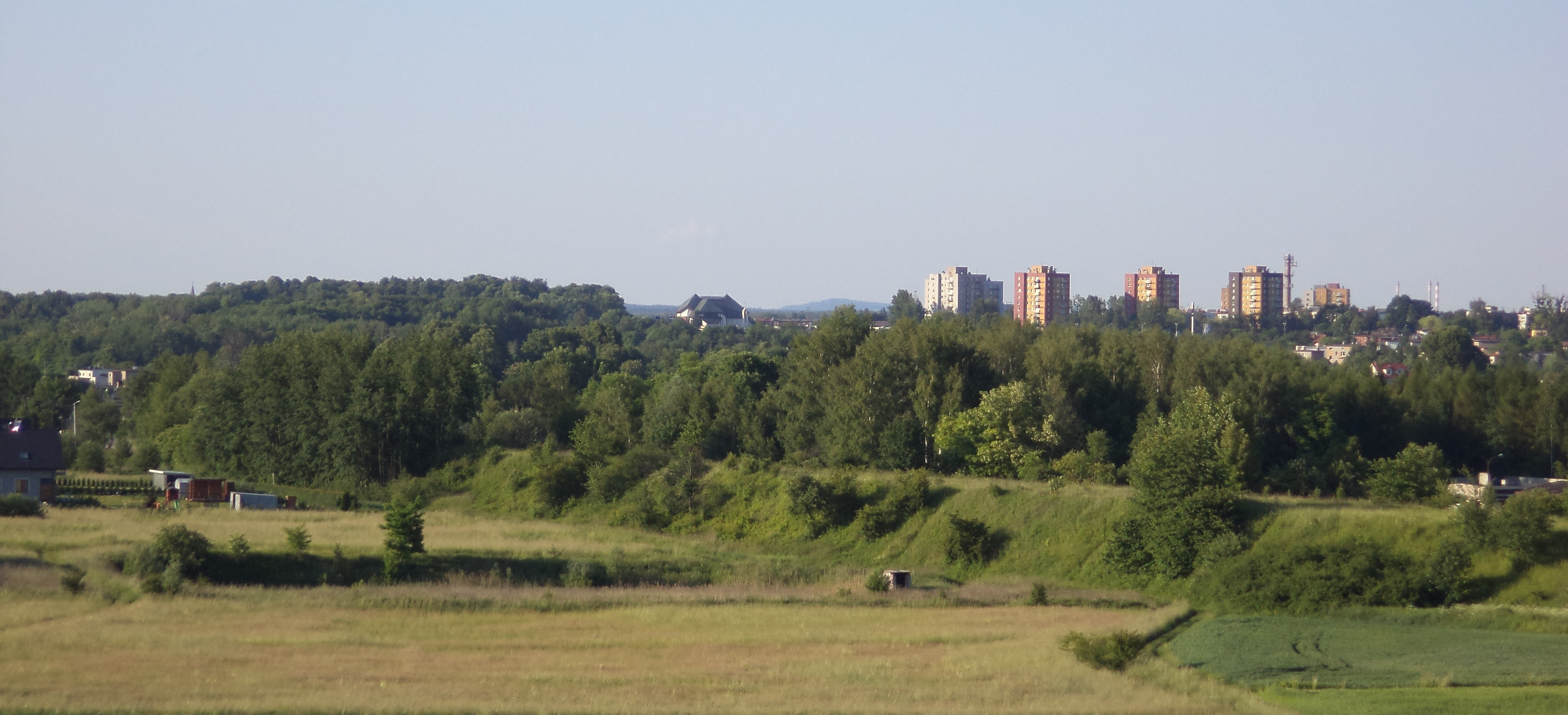 Widok z hałdy popłuczkowej w Tarnowskich Górach na dzielnicę Osada Jana